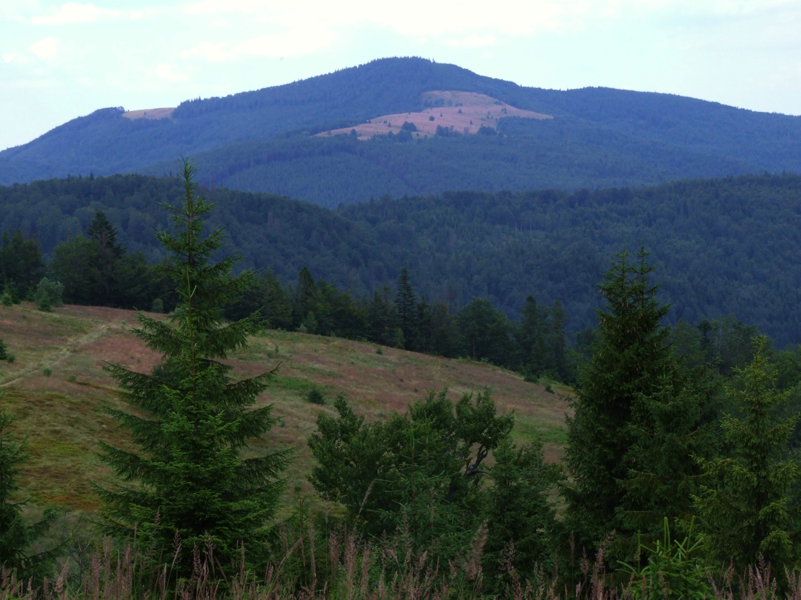 Mogielica, widok z Jasienia. Na dole zdjęcia polana Skalne